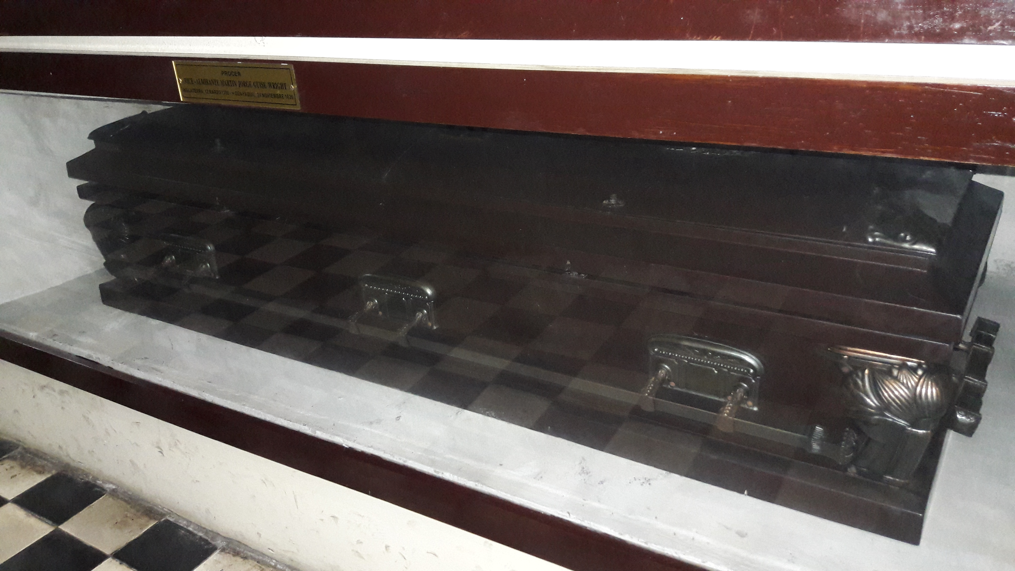 Tumba de Martín Guise